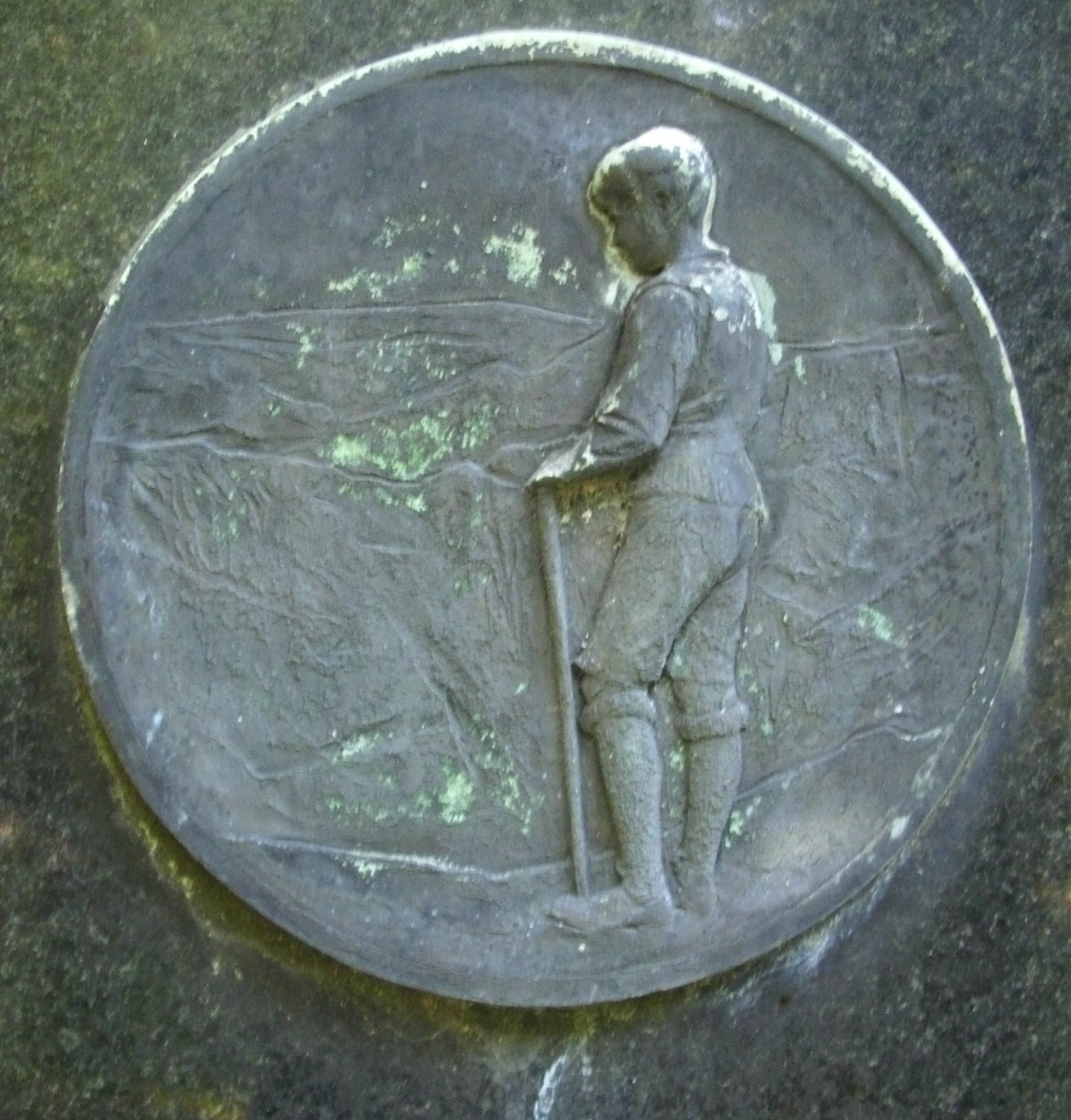 Albrecht Leistner: Wandernder Knabe, 1933, Bronzerelief, Südfriedhof Leipzig